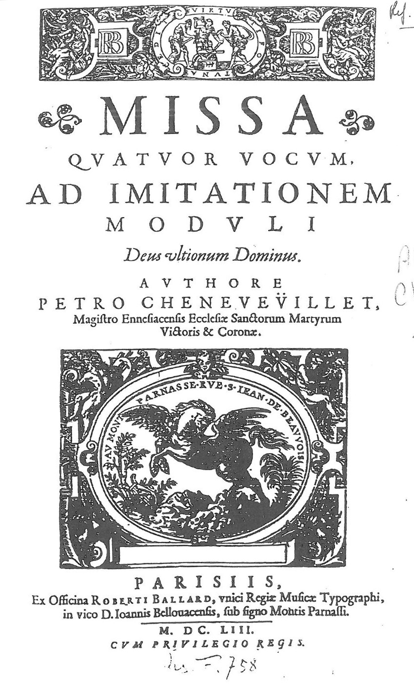 Title page of Cheneveuillet Missa Deus ultionum Dominum (1653).